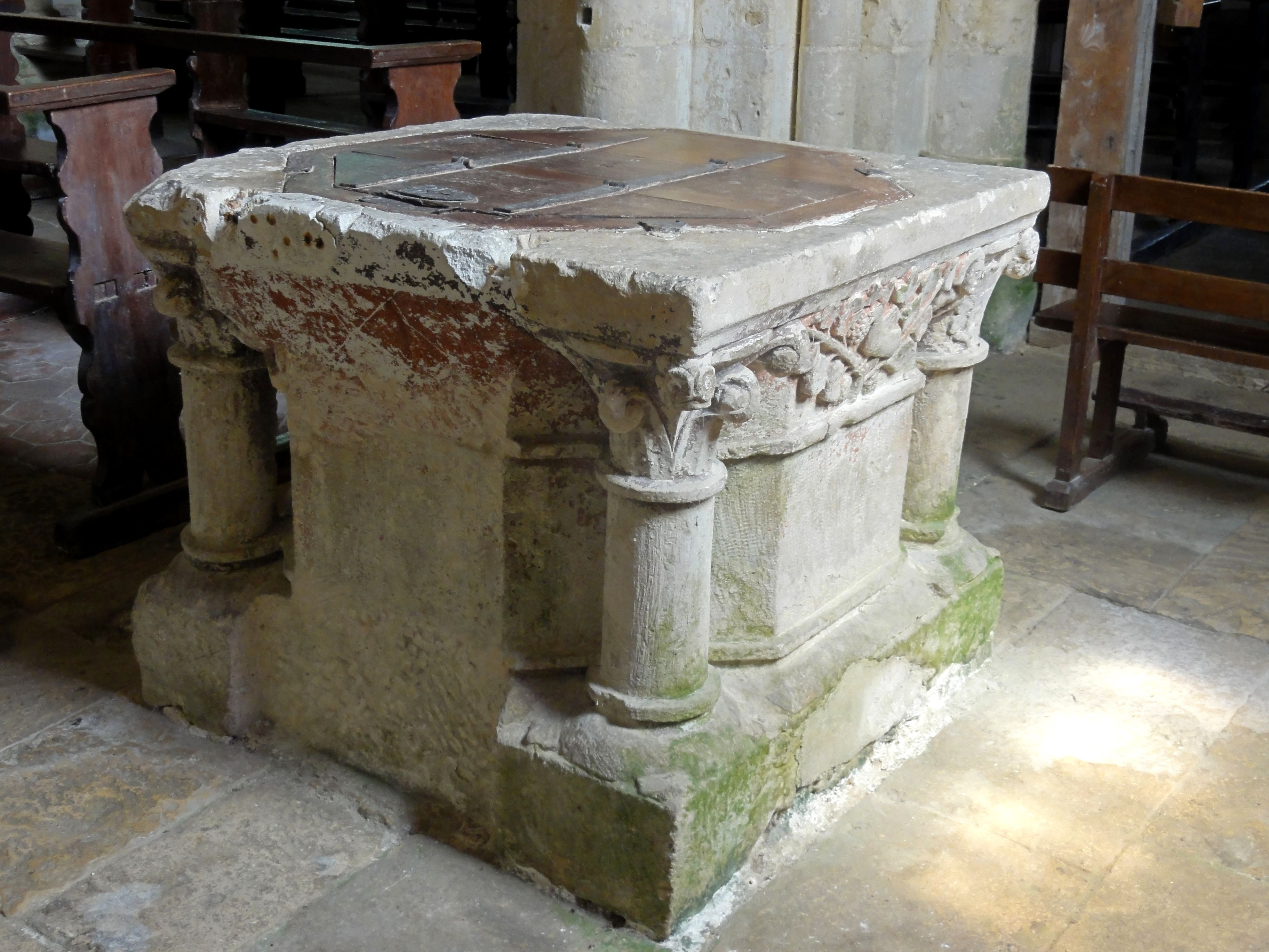 Fonts baptismaux.